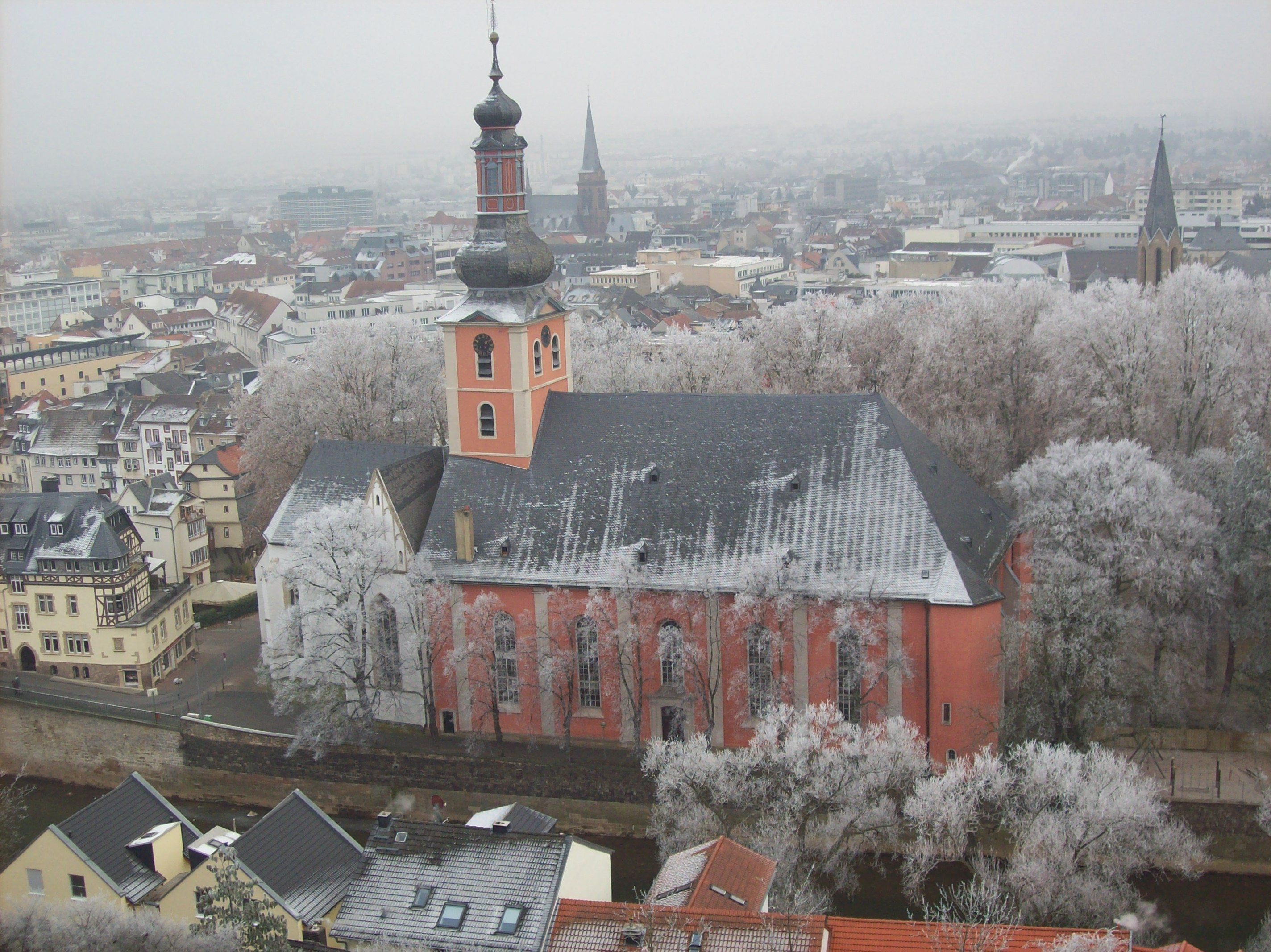 Evangelische Pauluskirche Bad Kreuznach, fotografiert in Richtung Süden